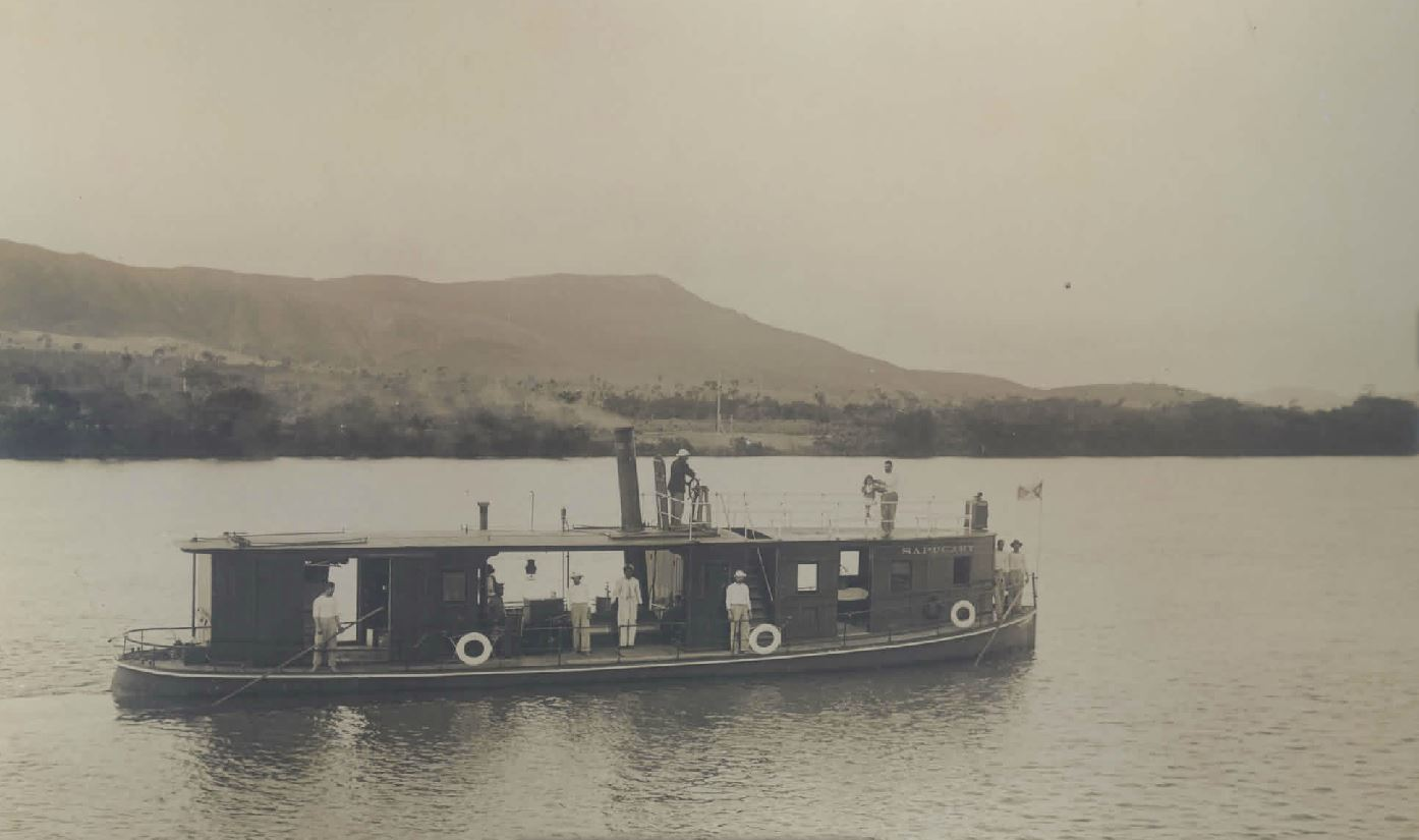 Barco a vapor navegando no Rio Sapucaí em Minas Gerais (c. 1906-1908)